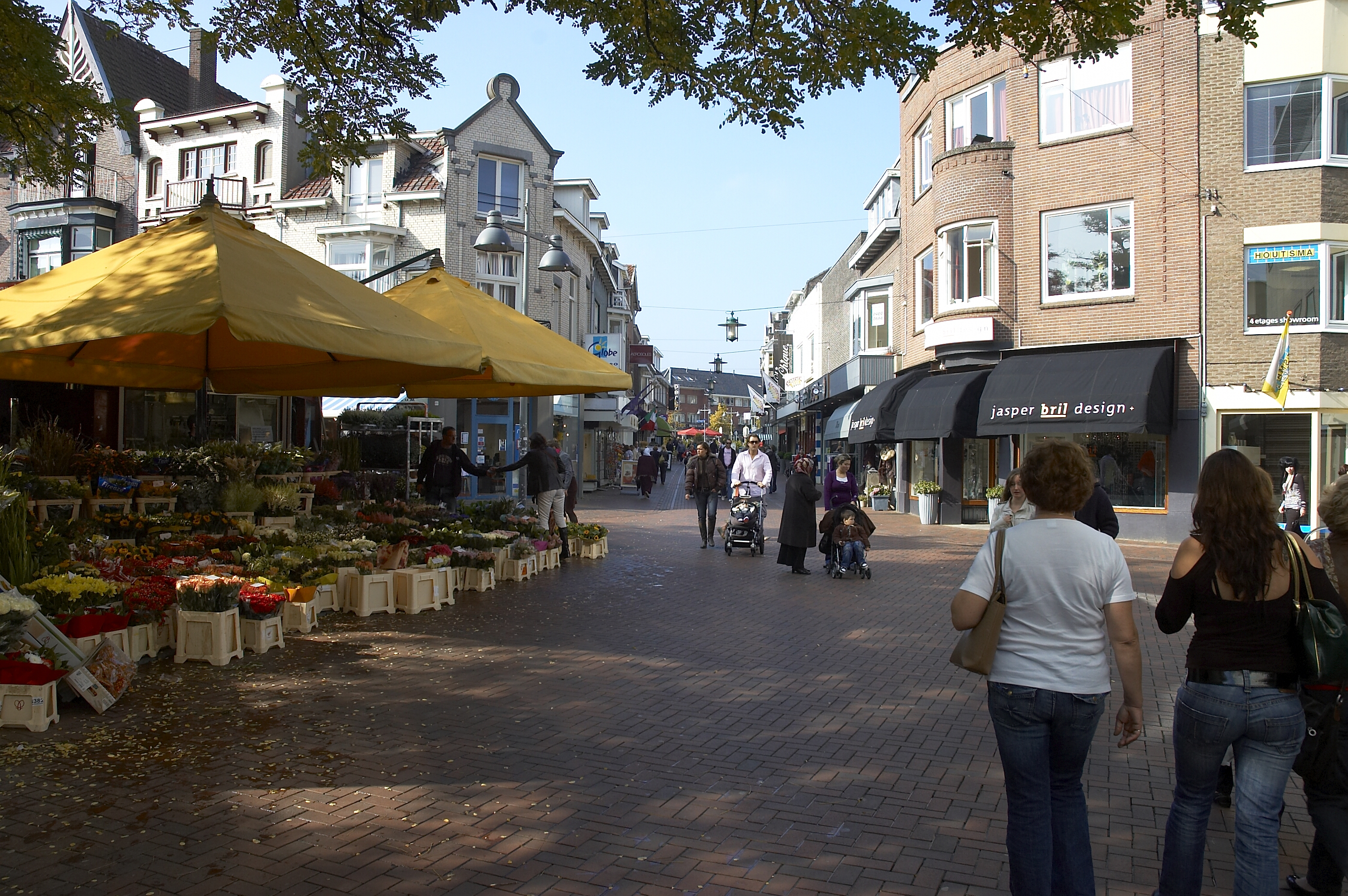 Centrum van Hilversum